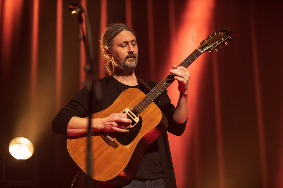 Den svenske musikeren og forfatteren Oscar Danielson på scenen på Parkteatret i Oslo.